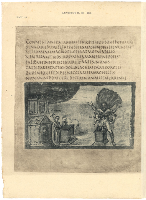 Reproduction du folio 18v du Vergilius Vaticanus dans le fac-similé photographique édité en 1899 : la mort du Laocoon.